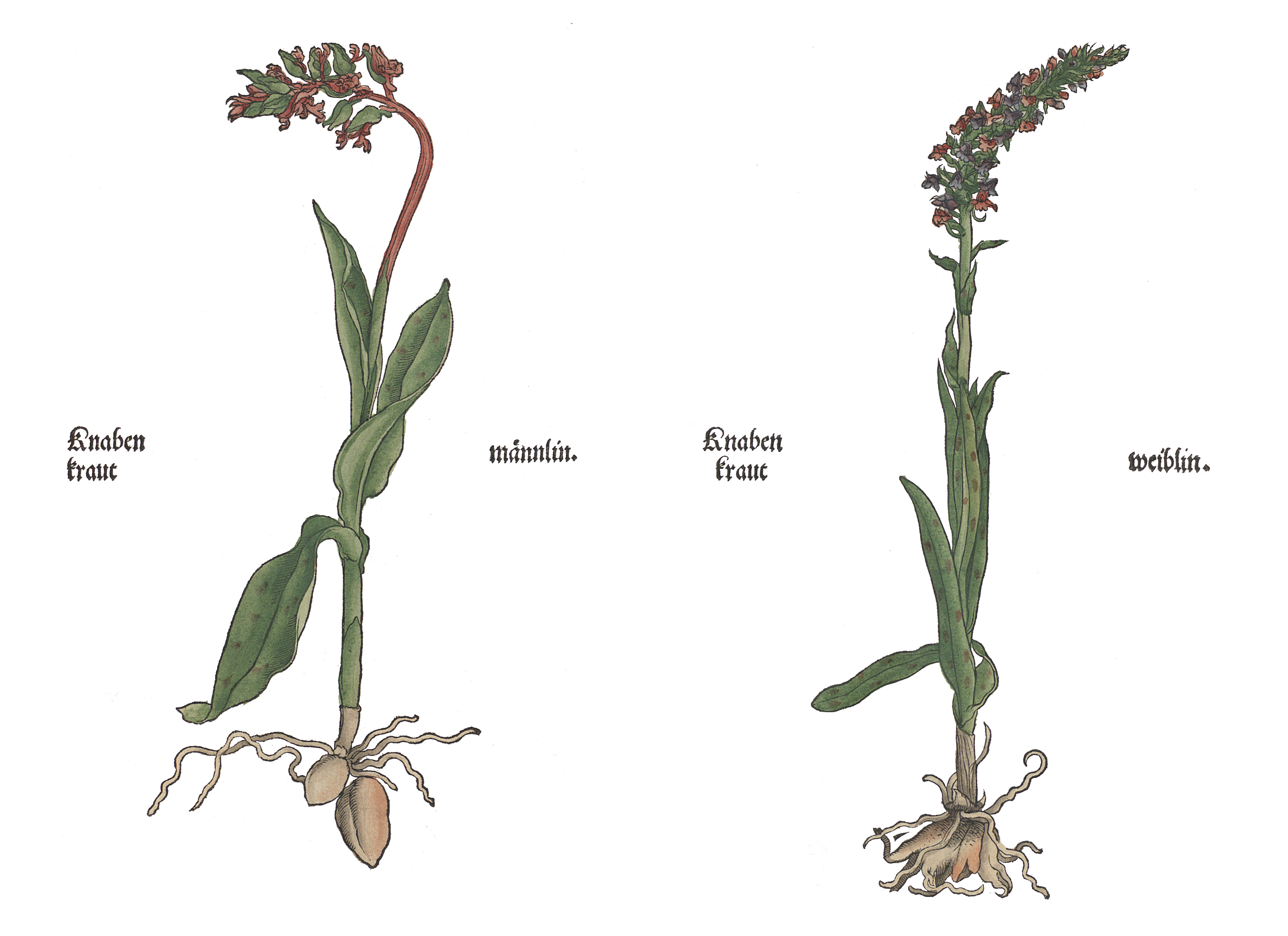 Orchideenarten